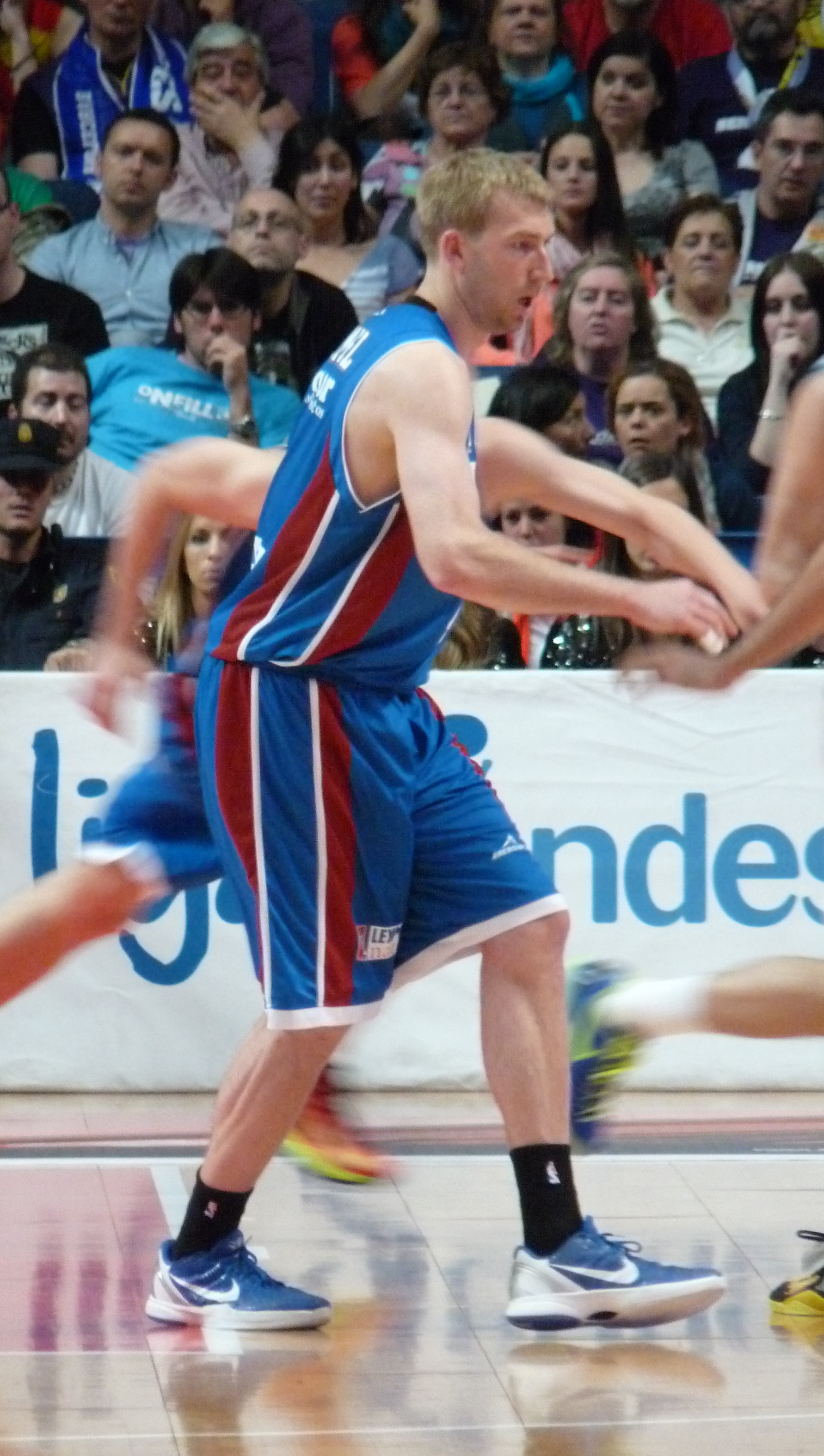 Robbie Hummel